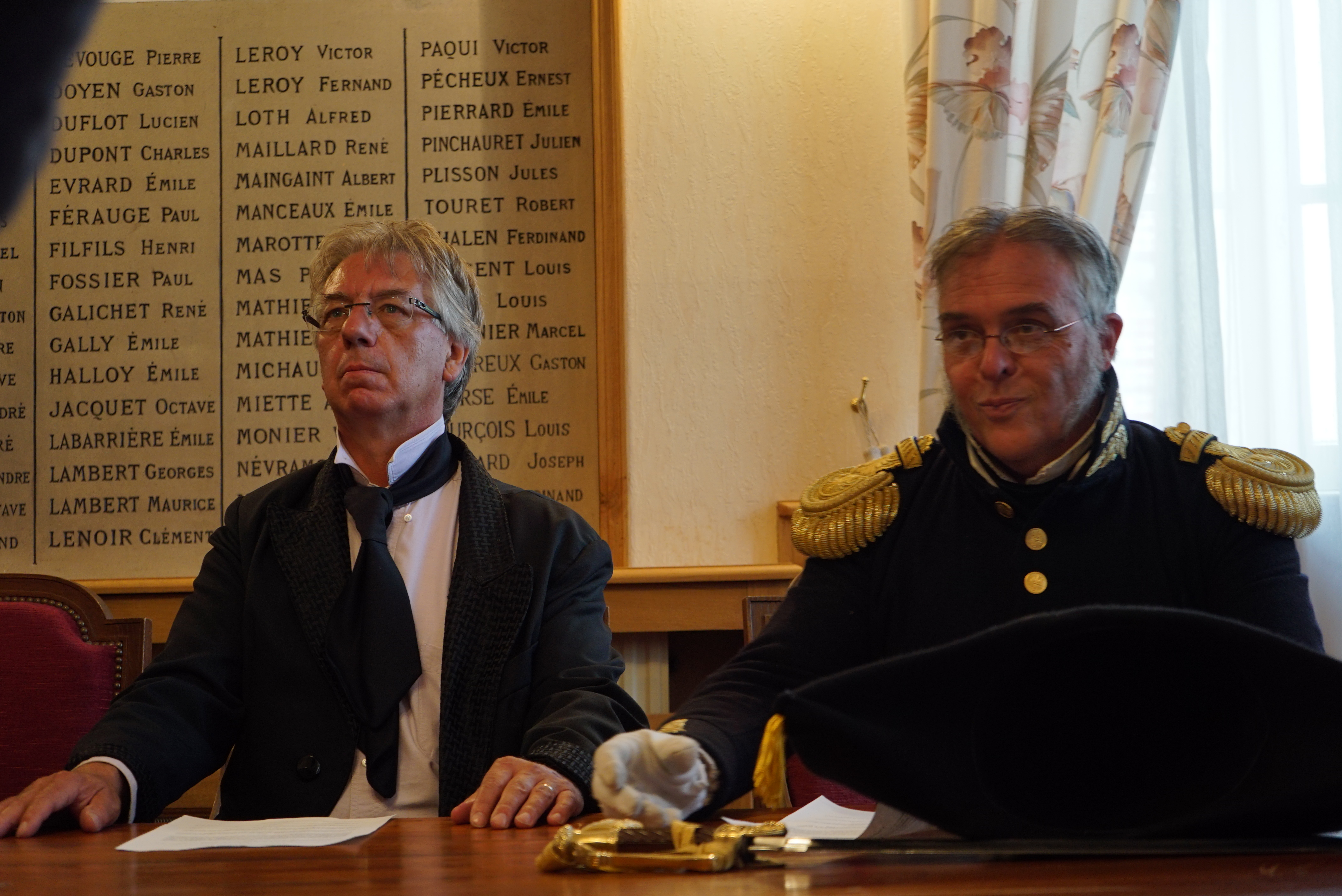 dans la mairie de Rocroi.